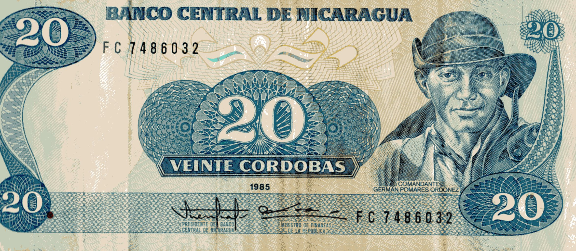 20 Córdoba-Banknote, Zentralbank von Nicaragua, 1985, Vorderseite. Konterfei von Comandante Germán Pomares Ordonez (1937-1979) der Frente Sandinista de Liberacion Nacional. Vermutlich 1987 durch Währungsreform abgelöst.